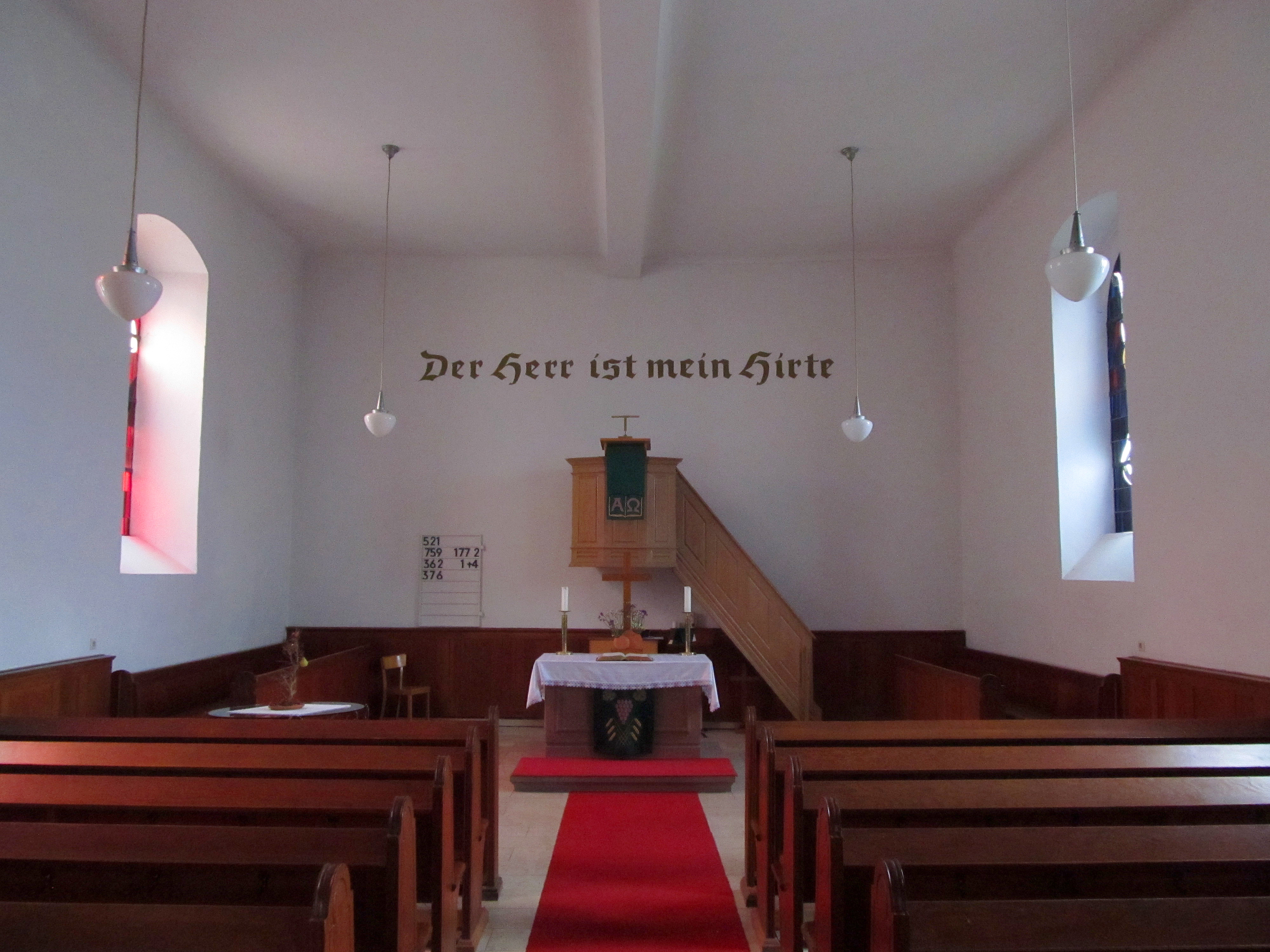 Blick ins Innere der protestantischen Kirche in Wolfersheim, einem Stadtteil von Blieskastel, Saarland